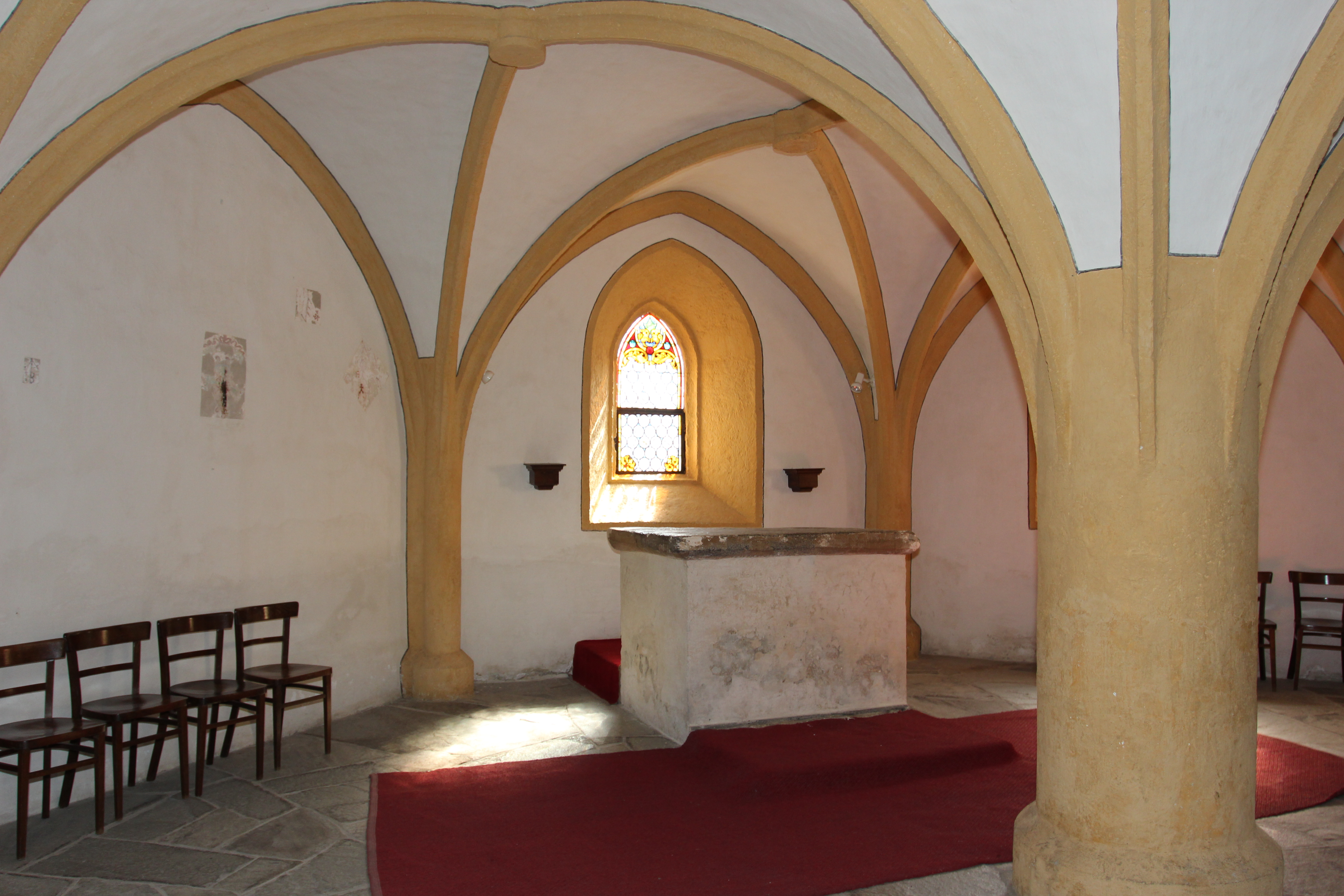 Krypta der Kath. Pfarrkirche hl. Vinzenz (Pfarrkirche Heiligenblut), Heiligenblut am Großglockner, Österreich.